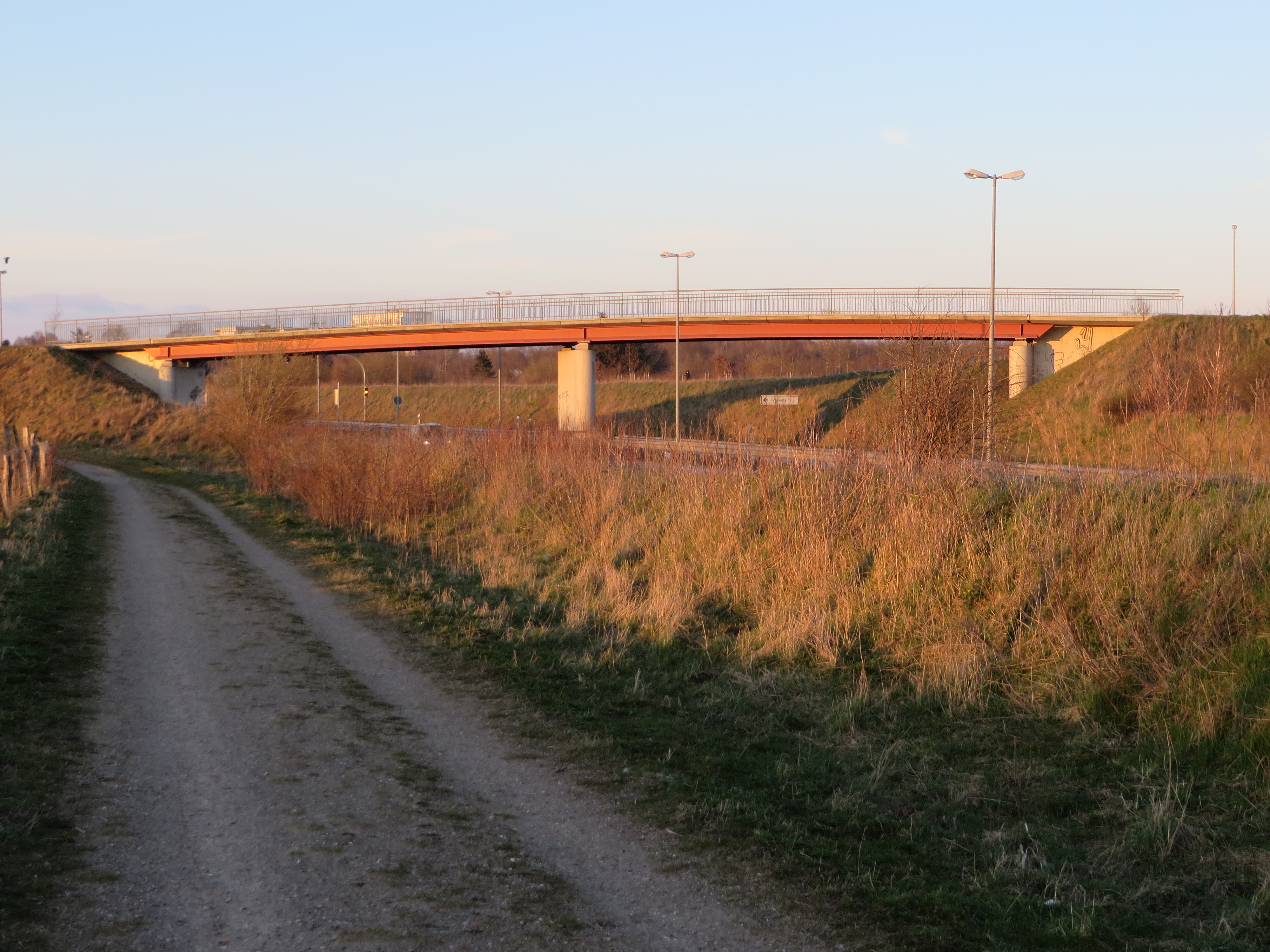 Blick von der Westseite zur Fußgängerbrücke vom Adelbyer Kirchenweg die über die Osttangente geht (2014)